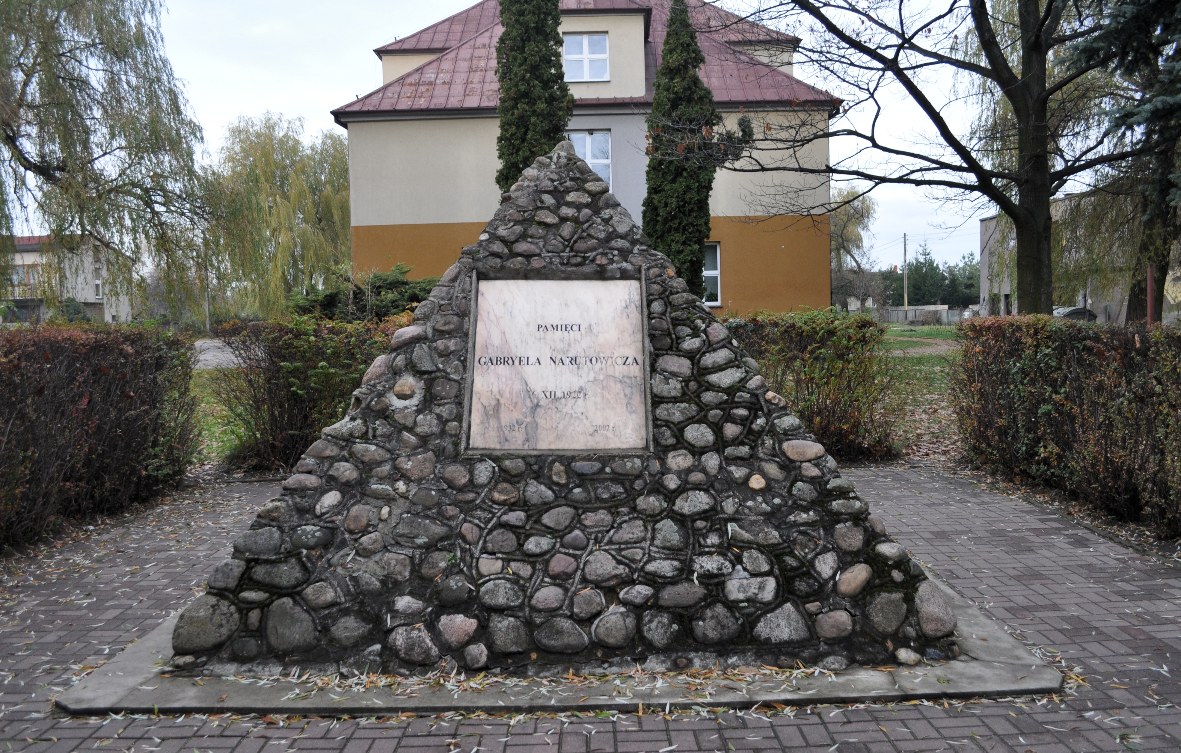 Ten obiekt znajduje się w Ewidencji Miejsc Pamięci Województwa Śląskiego dla miejscowości Częstochowa pod numerem 101/34.Opis